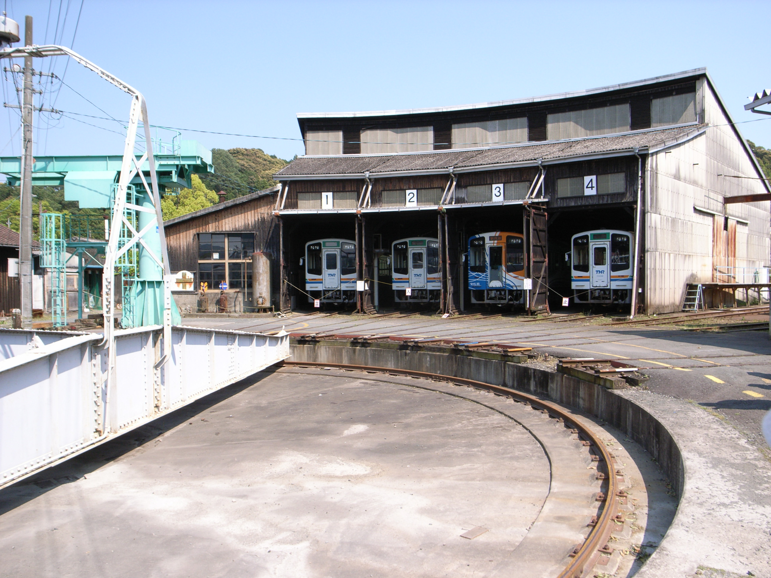 天竜二俣駅 転車台と扇形庫 Ricoh GR Digital